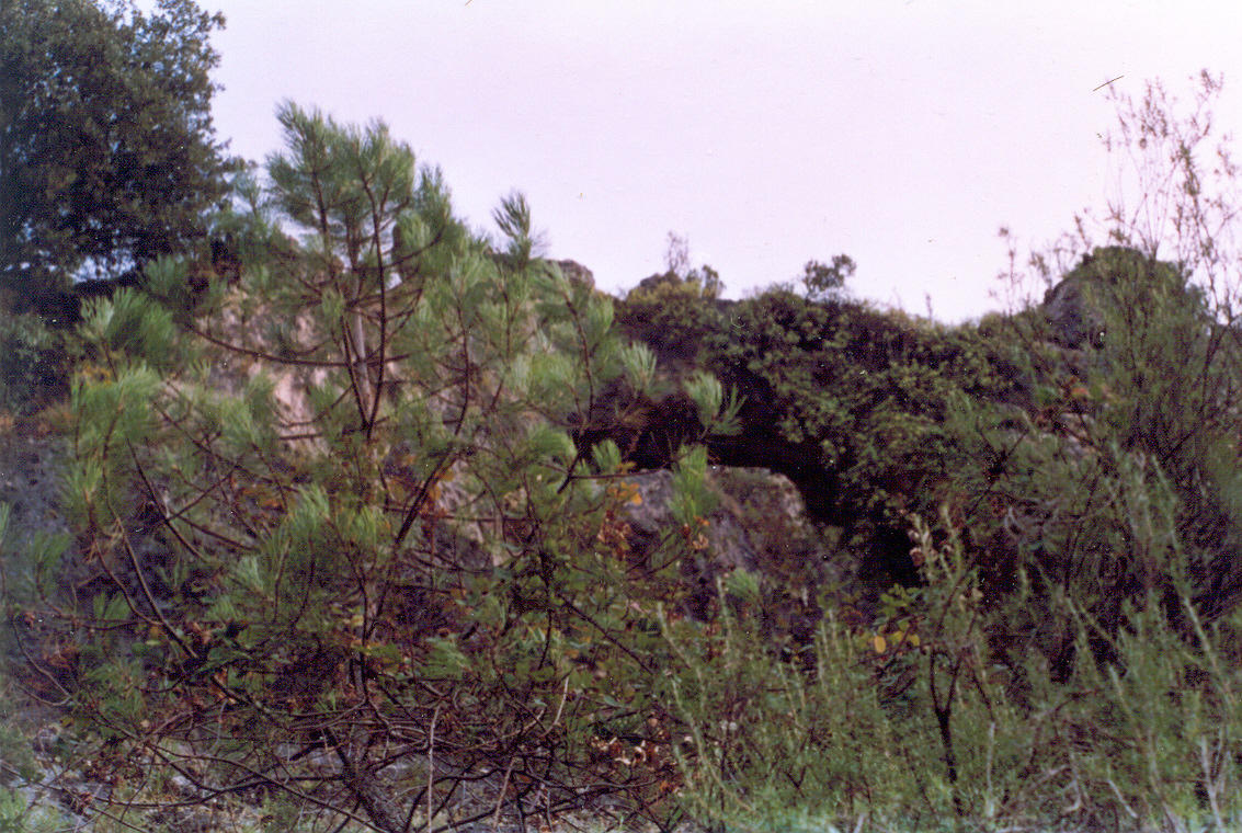 Vegetación de Beas de Segura en la parte que corresponde al Parque Natural